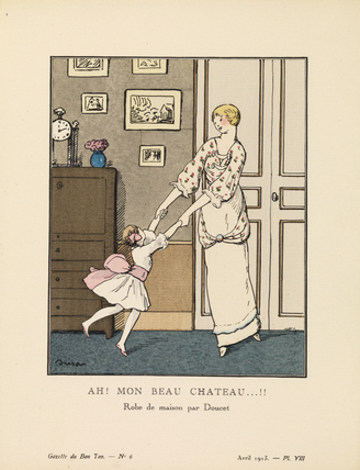 Fashion plate from 1913 Gazette du Bon Ton fashion magazine illustrating Jacques Doucet dress Title: "Ah! Mon beau chateau...!! Robe de maison par Doucet" ("Ah! My beautiful mansion! House dress by Doucet"